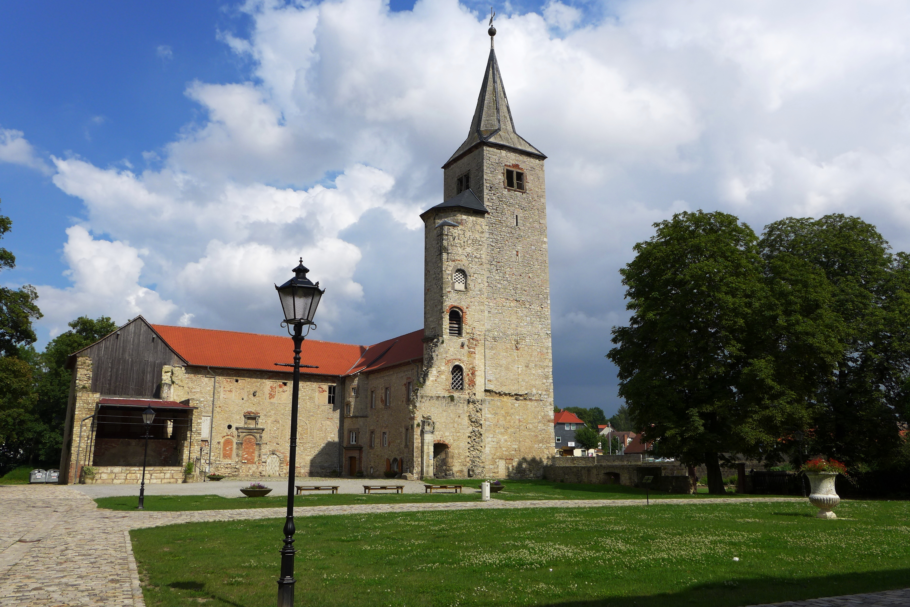 Hof des Schlosses Hessen mit nur noch teilweise erhaltenen Gebäuden